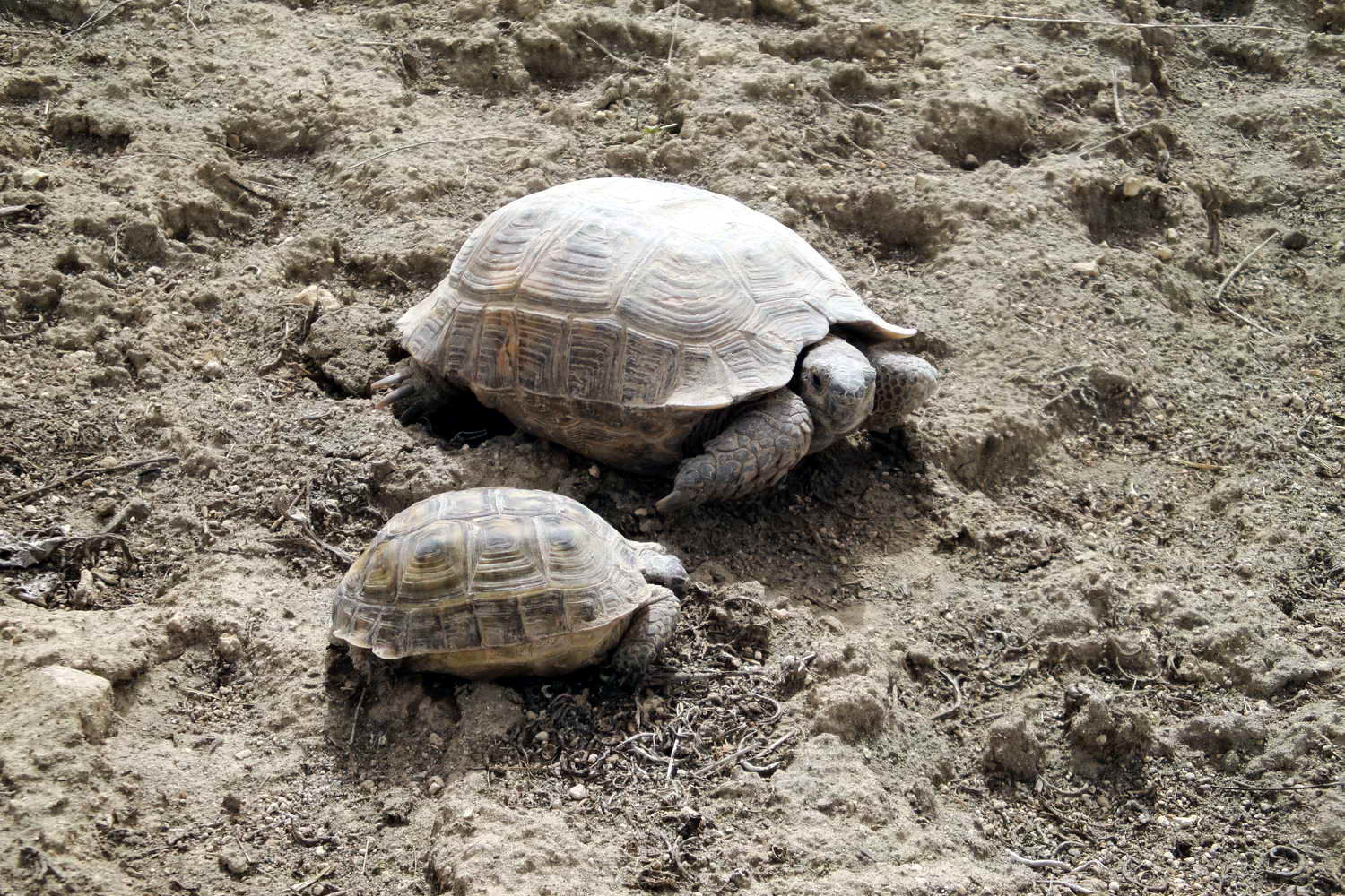 Testudo graeca armeniaca